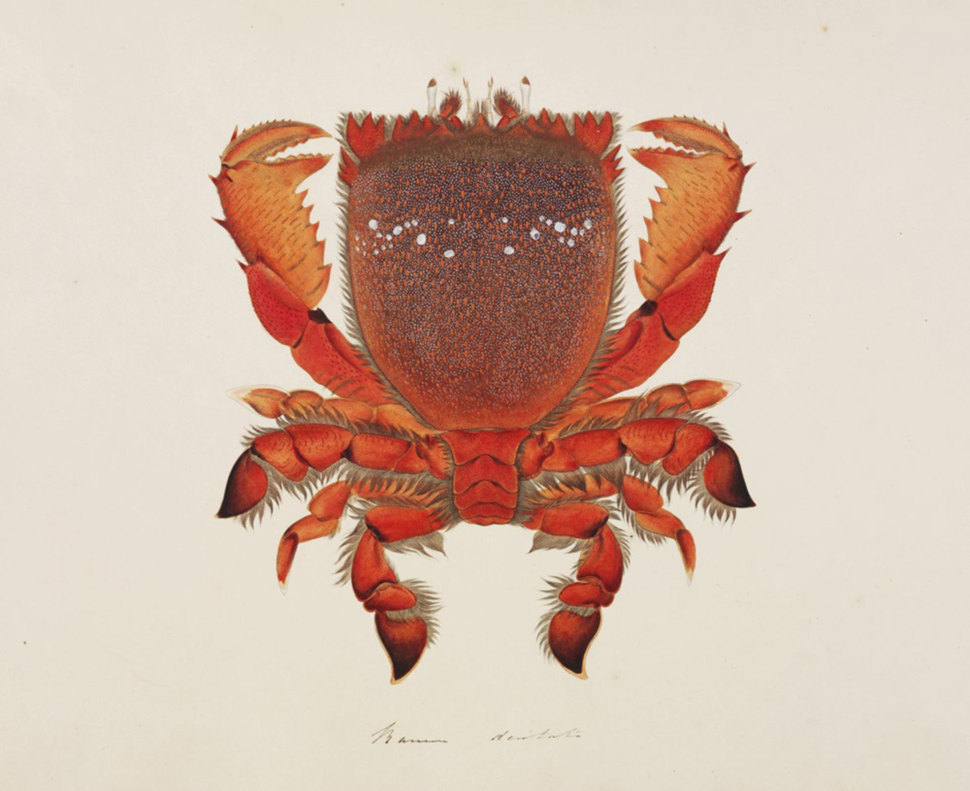 Ranina ranina